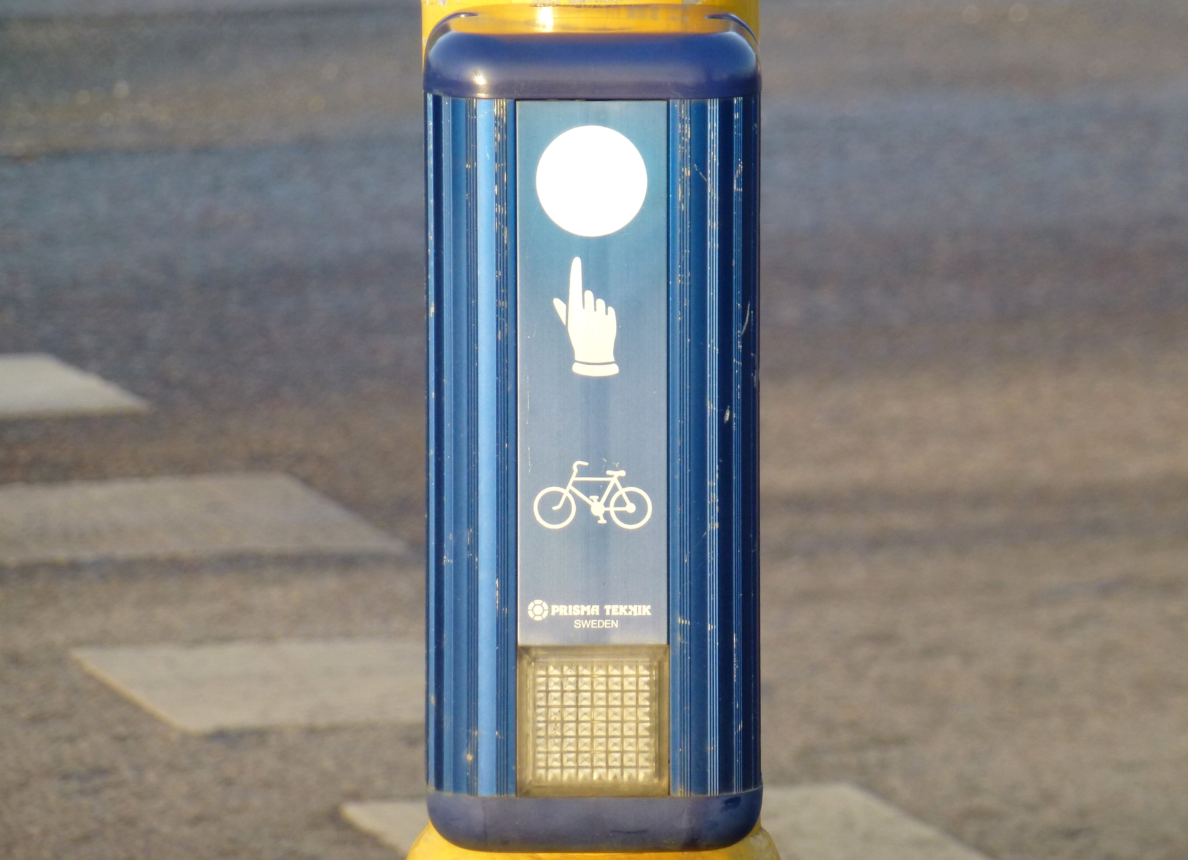 Cykelsignal tryckknapp i Stockholm